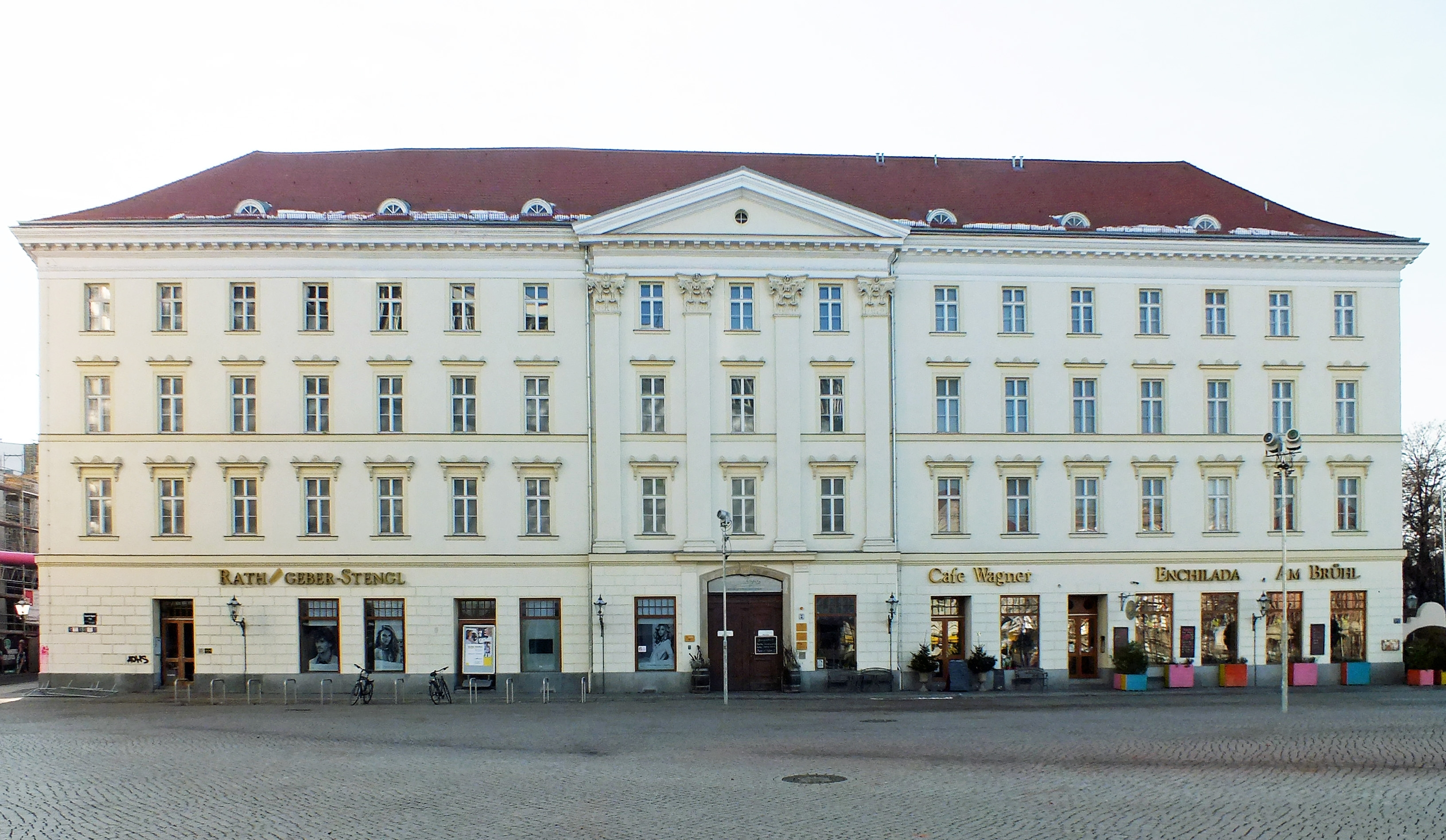 Das Wohn- und Geschäftshaus Großer Blumenberg in Leipzig